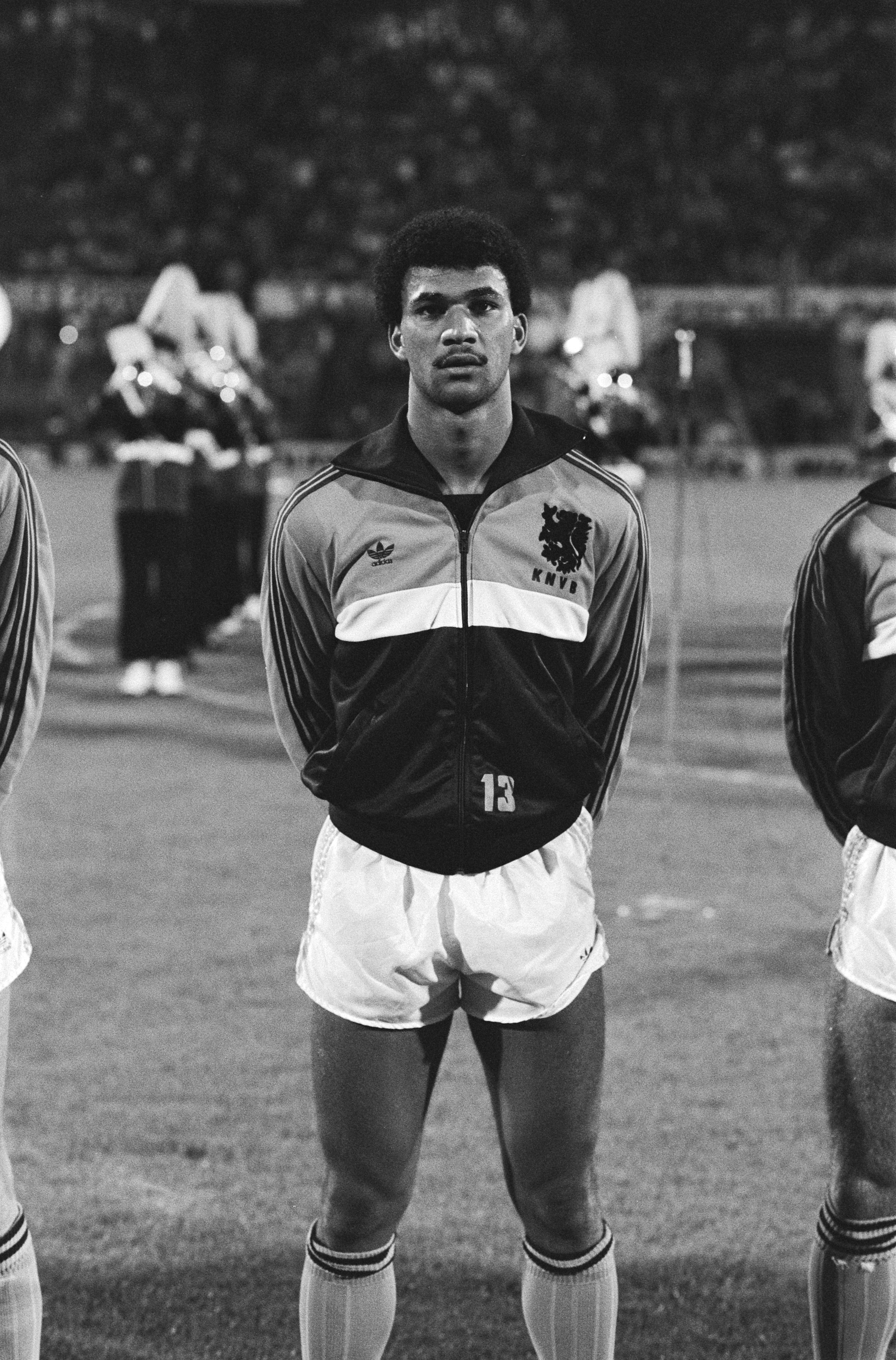 Collectie / Archief : Fotocollectie Anefo Reportage / Serie : Interland Nederland tegen Ierland (2-1) in de voorronde van het Europees Beschrijving : Gullit tijdens het spelen van de volksliederen Annotatie : Randnummers negatiefstroken: 6, 7, 8, 9 Datum : 22 september 1982 Locatie : Rotterdam, Zuid-Holland Trefwoorden : muziekkorpsen, portretten, sport, voetbal Persoonsnaam : Gullit, Ruud Fotograaf : Antonisse, Marcel / Anefo Auteursrechthebbende : Nationaal Archief Materiaalsoort : Negatief (zwart/wit) Nummer archiefinventaris : bekijk toegang 2.24.01.05 Bestanddeelnummer : 932-3389